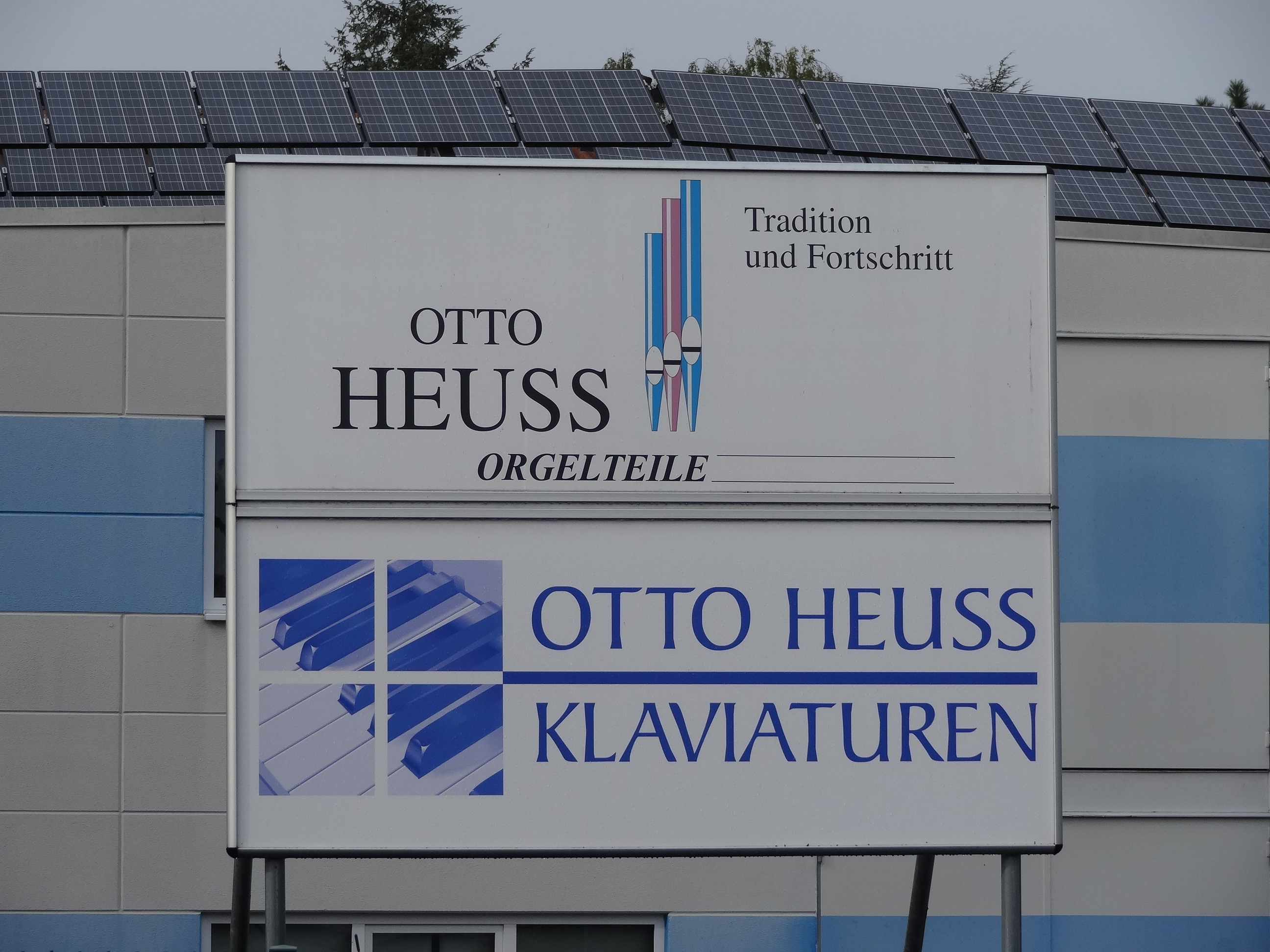 Otto Heuss Companies